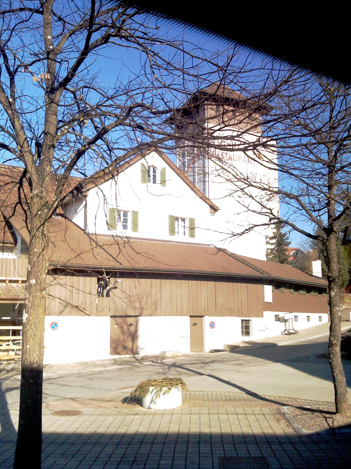 Oberembrach Tower Mill - Turmuelilo en Oberembrach